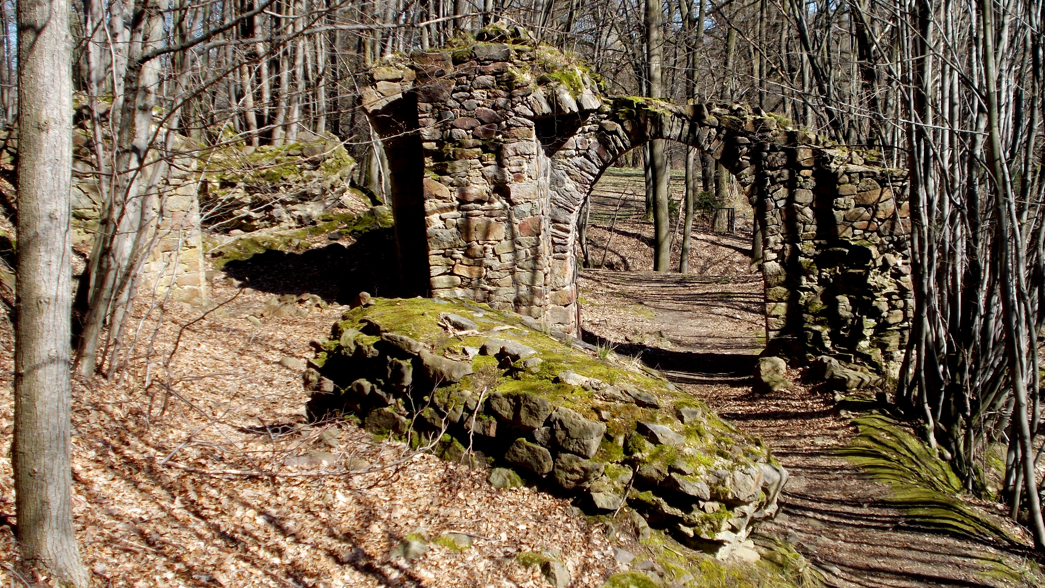 Kirschau Burgruine Körse Eingang